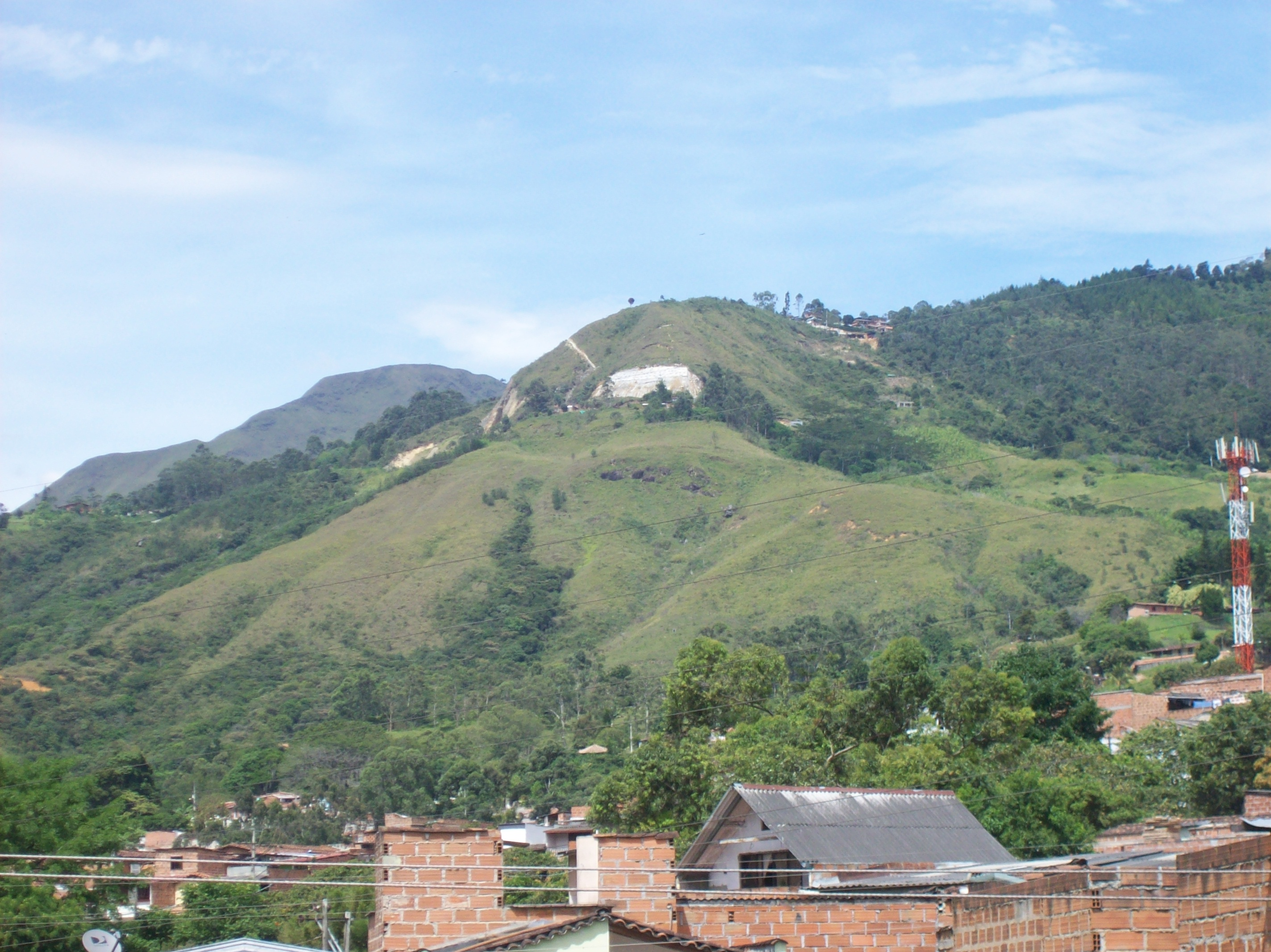 Esta es la principal salida de medellín hacia Bogotá